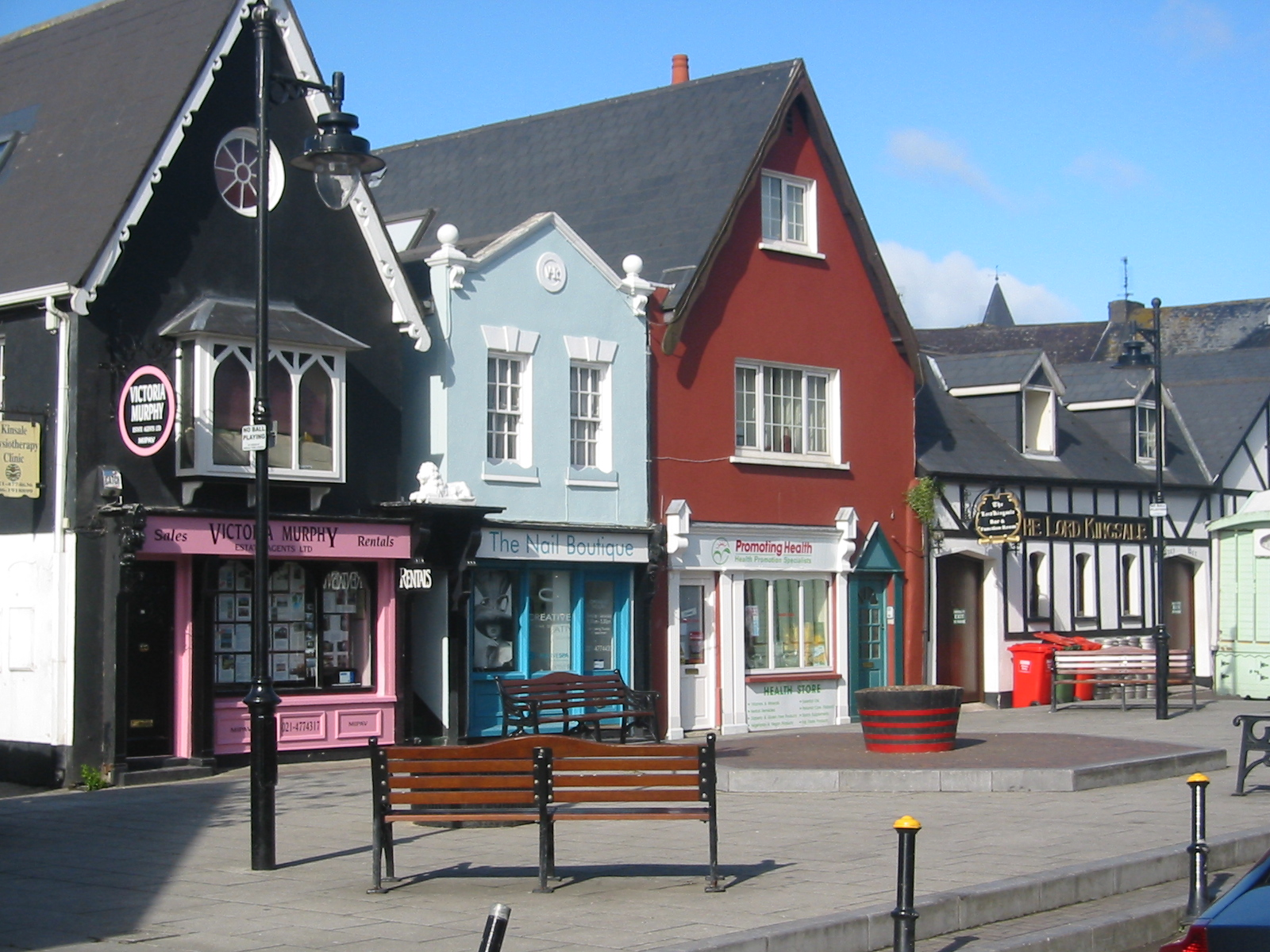 Kinsale Market Place